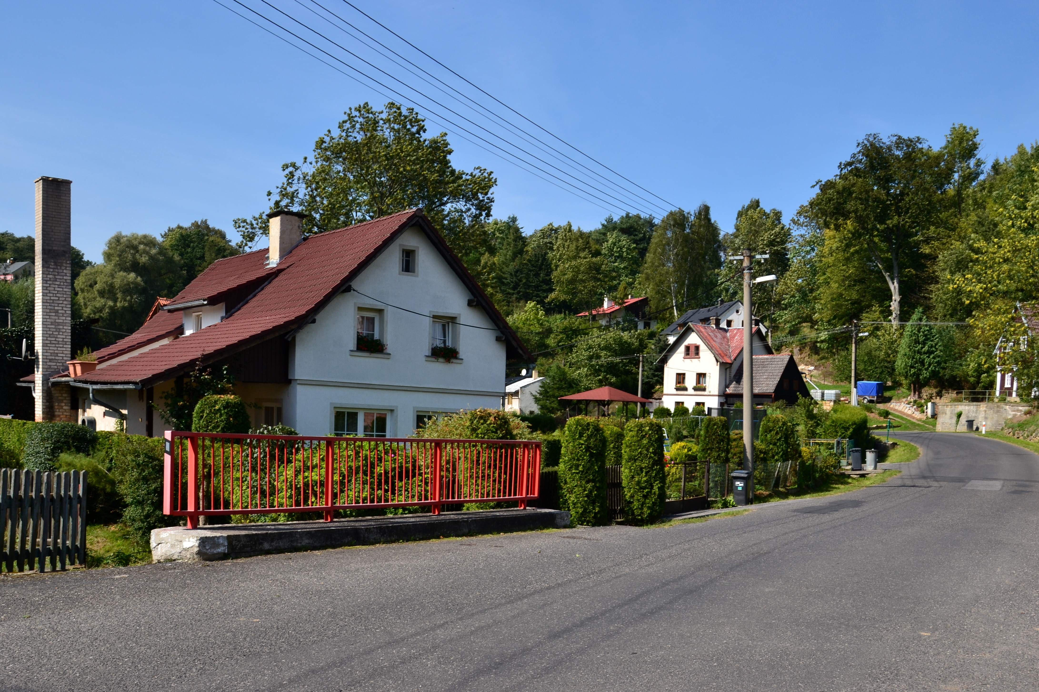 Domy v západní části vesnice